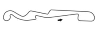 Streckenverlauf Autodrom Sankt Petersburg Variante A